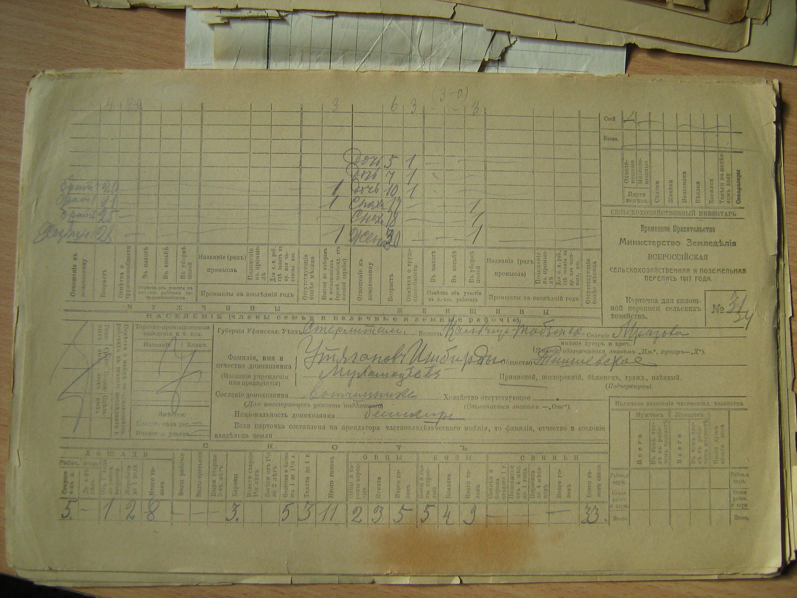 Бланк Российской сельскохозяйственной переписи 1917 года. Селение Мораз, Кальчир-Табынская волость, Стерлитамакский уезд, Уфимская губерна.